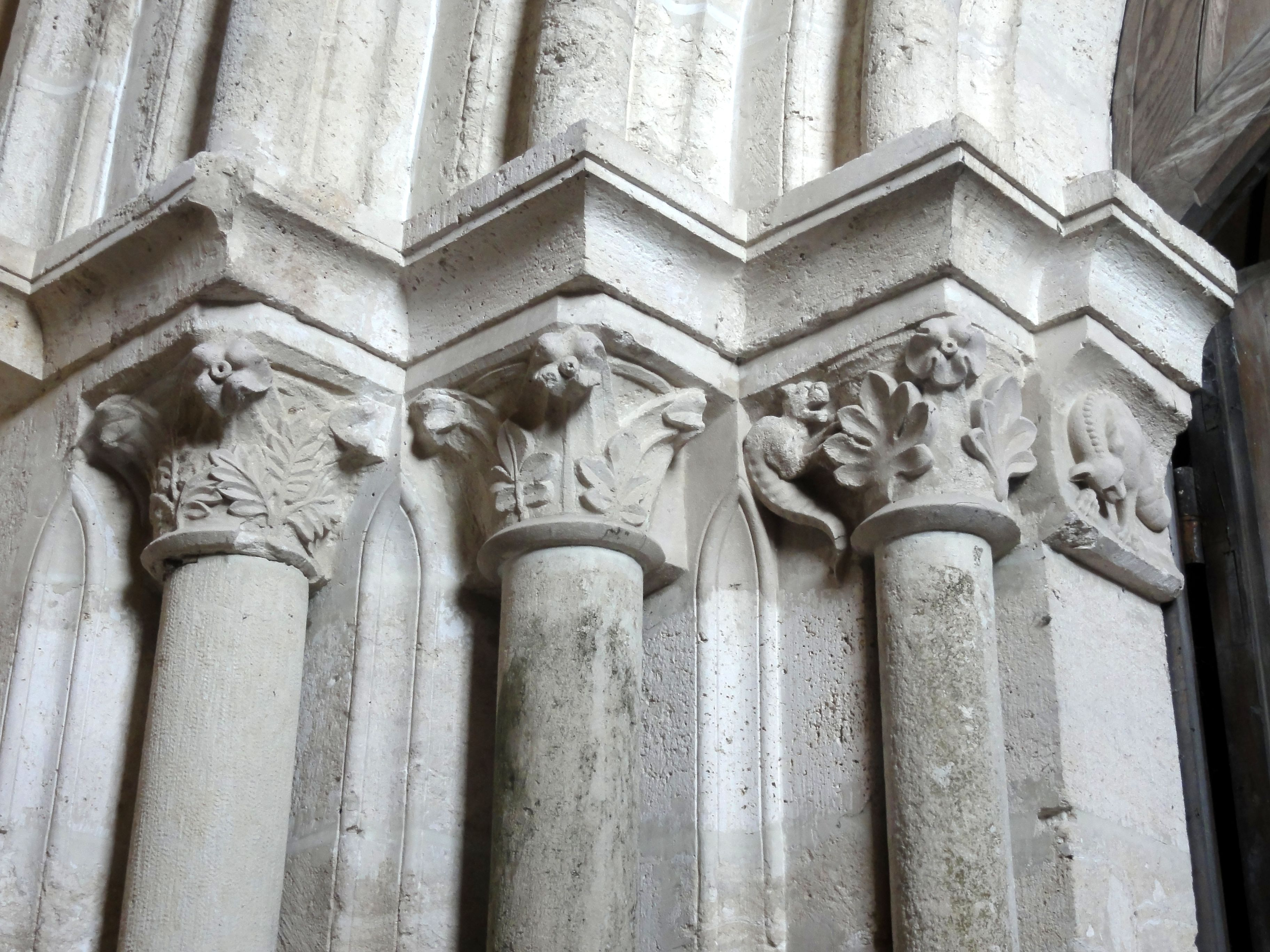 Portail occidental, chapiteaux.